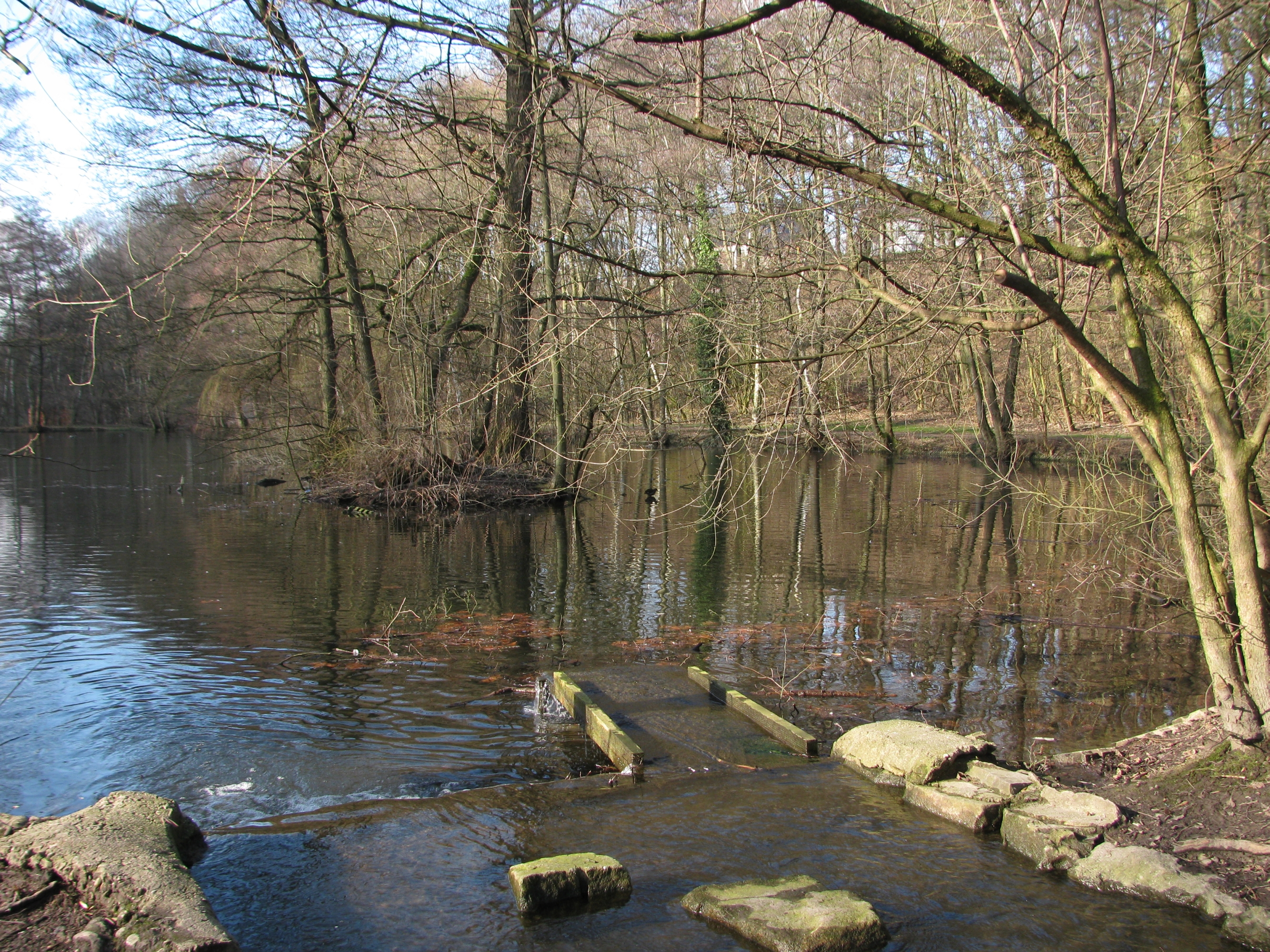 Tipulusteich in Bochum